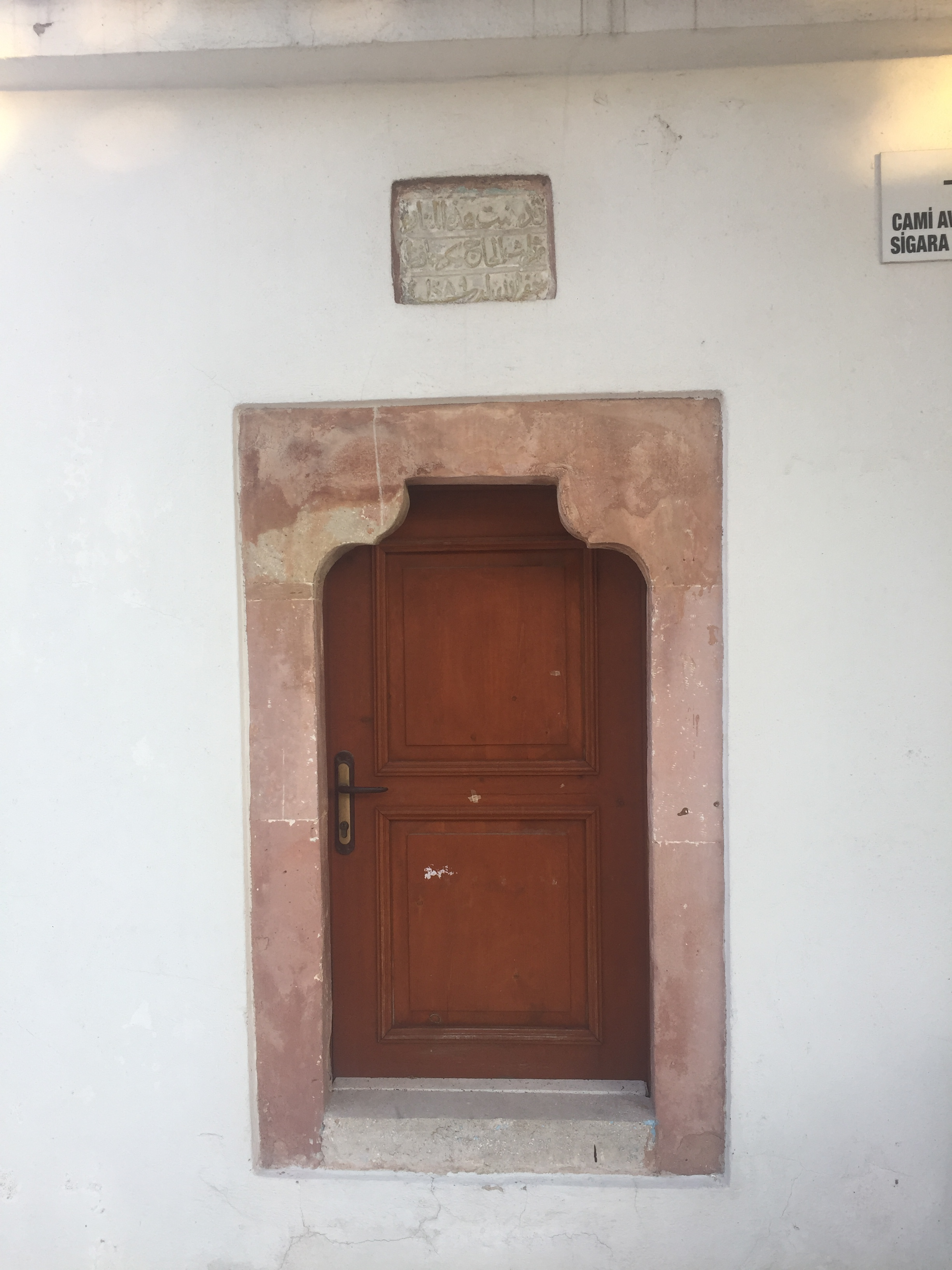 Sekibaşı Camii, Muğla